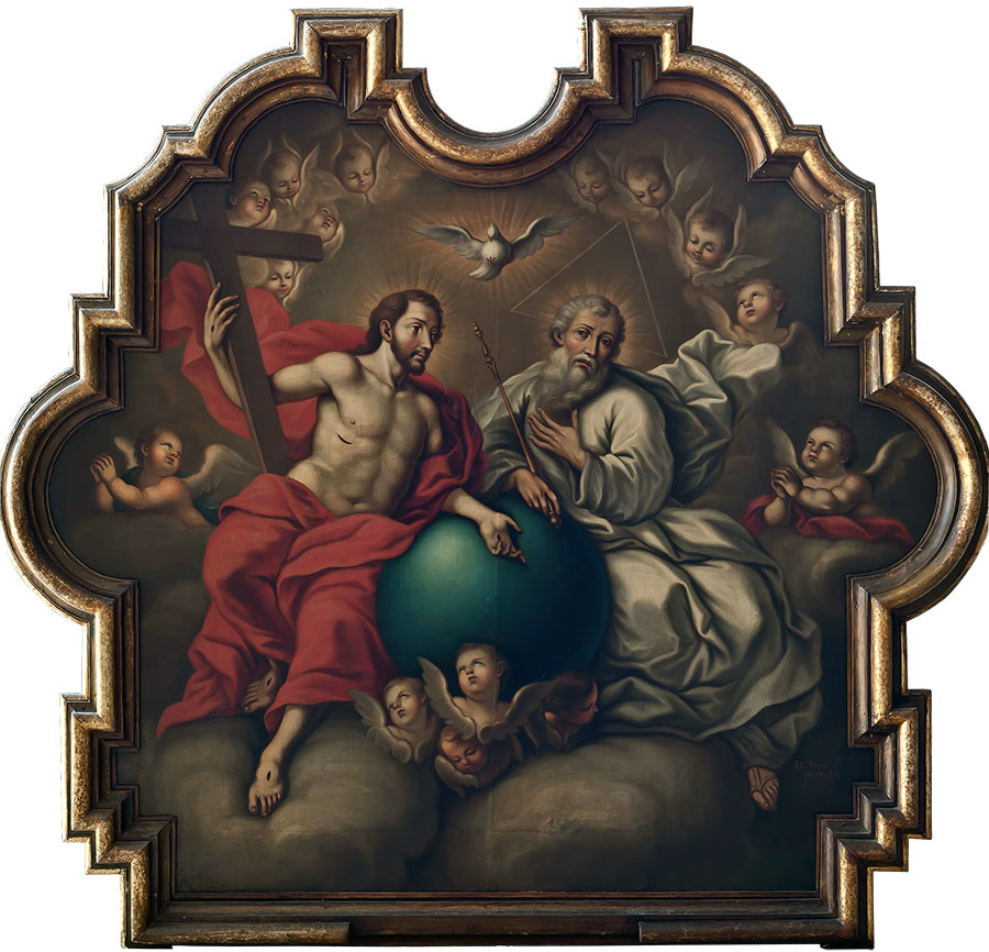 José Nicolás de la Escalera - La Santíssima Trinidad, séc. XVIII. Acervo do Museo Nacional de Bellas Artes de Havana, Cuba.